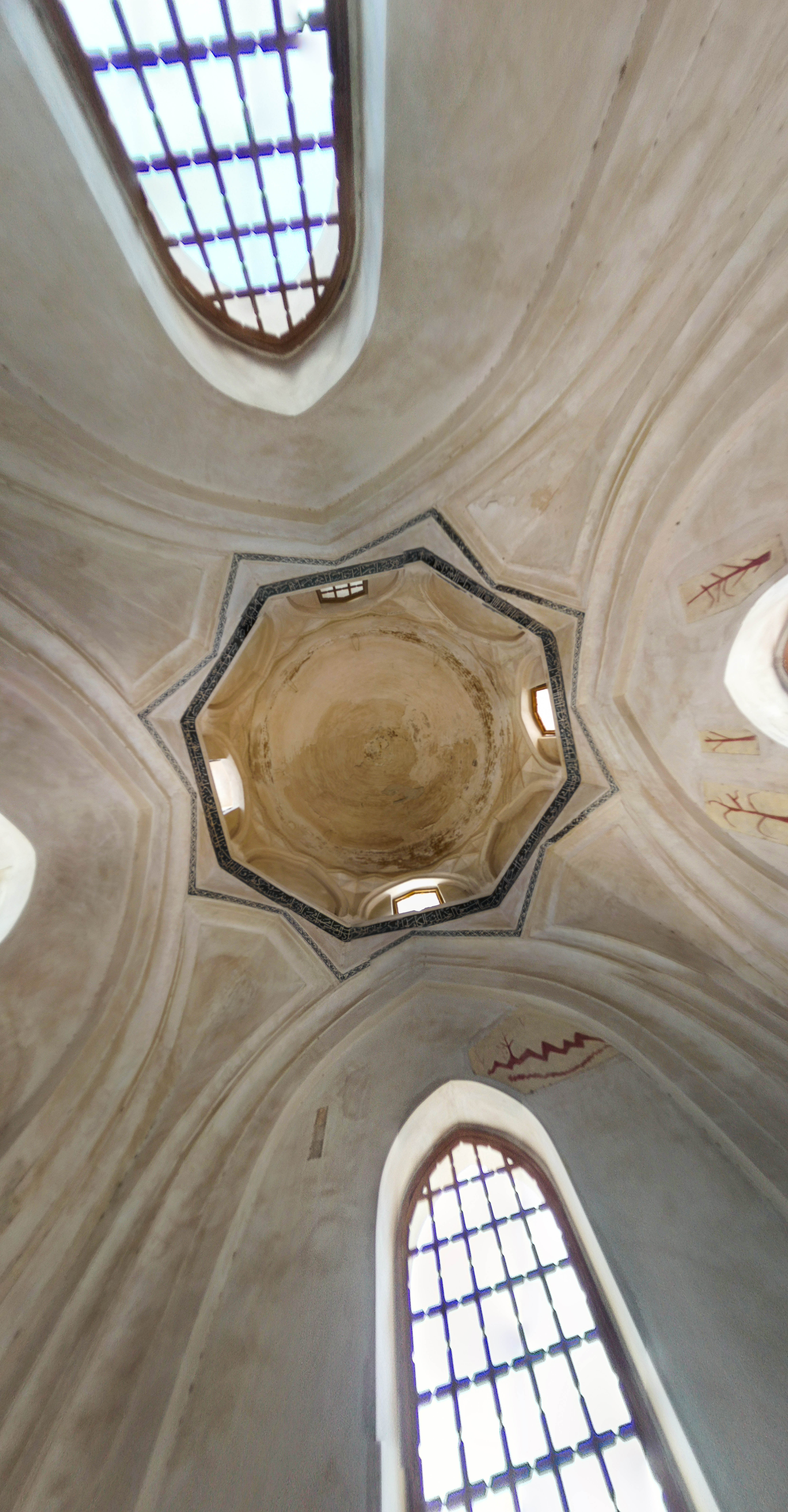 بنای چهارطاقی عصر تیموری یکی از آثار معماری خاص و جاذبه‌های به جای مانده در شهر شیروان در خراسان شمالی است که هر ساله گرشگران زیادی را به سمت خود جذب می‌کند.بناهای چهارطاقی نوع خاصی از معماری اصیل ایران است که سابقه آن به دوره اساطیری می‌رسد. آتشکده فریدون به نام بردسوره در بخارا، که در کتاب مسعودی از آن نام برده شده، یکی از بناهای چهارطاقی باستانی است. در دوره تاریخی نیز بنای نوبهار بلخ از آثاری است که سابقه آن به دوره اشکانی می‌رسد و با معماری چهارتاقی ساخته شده است. در بین بناهای دوره ساسانی نیز بناهایی از این دست دیده می‌شود. اما کهن‌ترین آرامگاه چهارتاقی مربوط به خاندان سامانی در بخارا است.